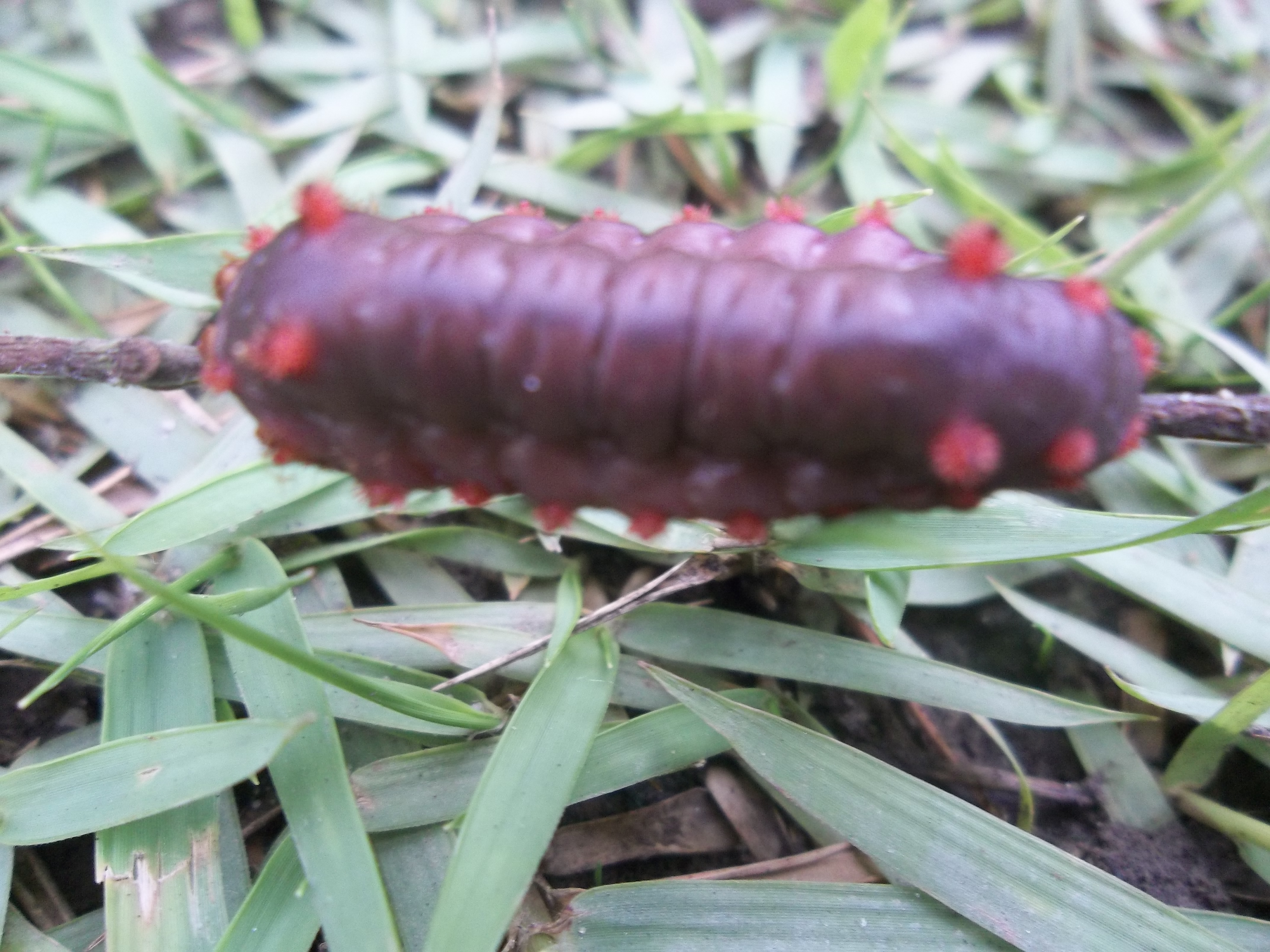 Lagarta vermelha encontrada em um parque de Manaus, Amazonas.